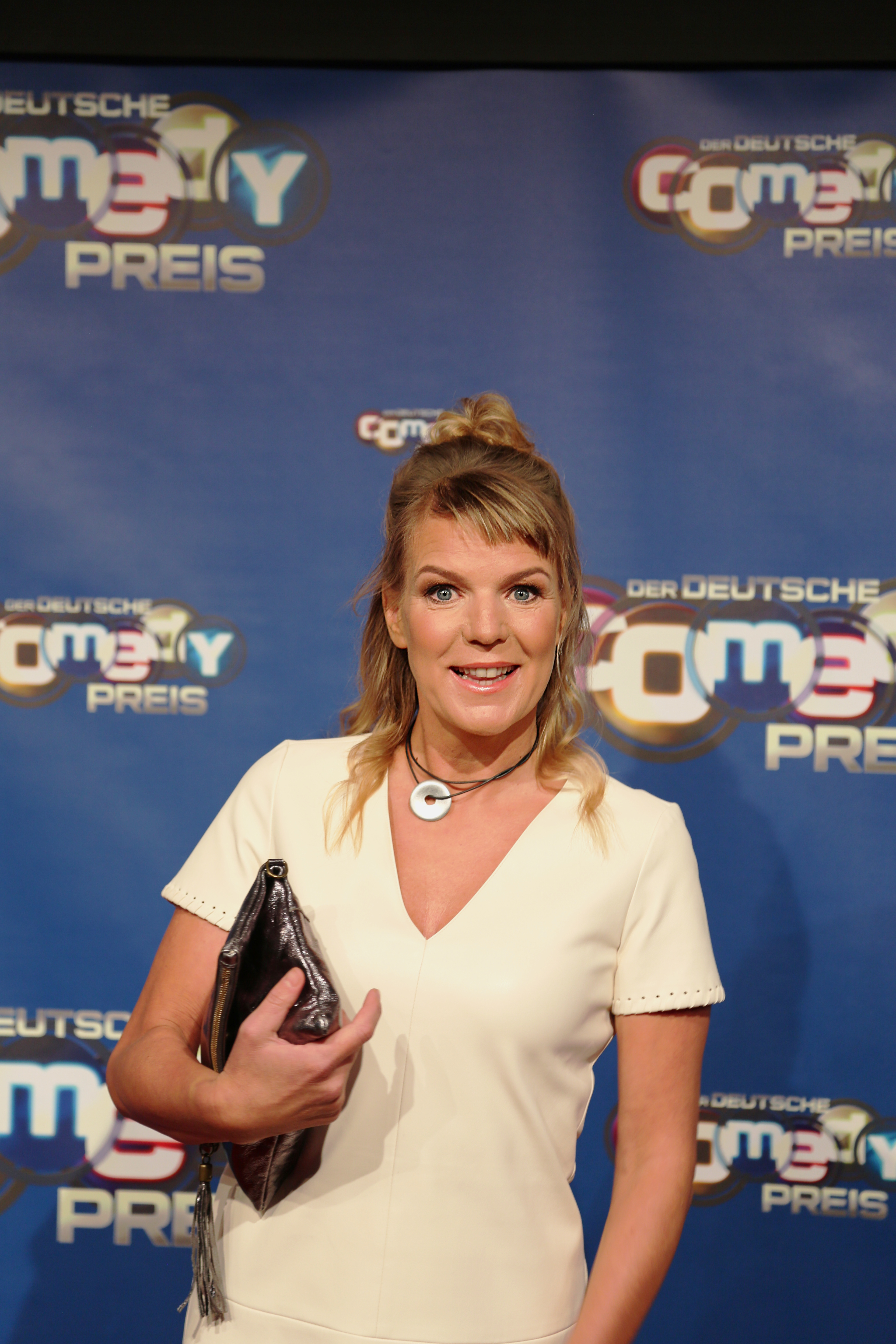 Mirja Boes beim Deutschen Comedypreis 2017.